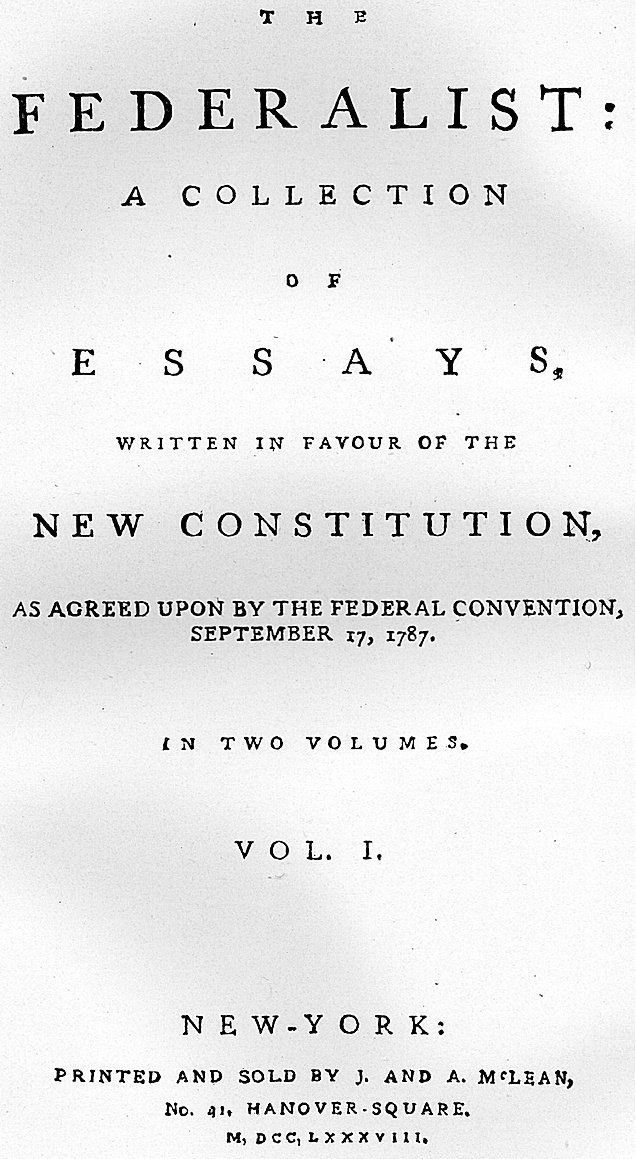 Federalist Cover 1788